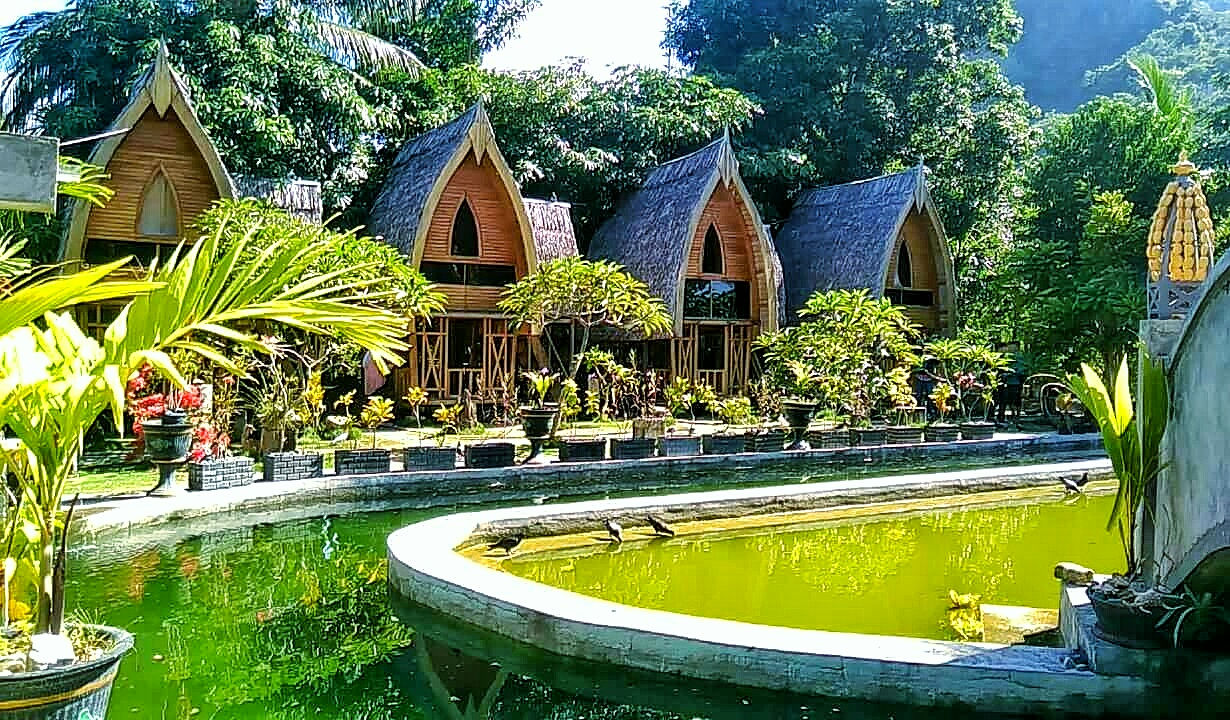 Desa Bubohu merupakan bekas kerajaan yang ada di Gorontalo dan sekarang dijadikan sebagai desa wisata religius oleh bapak Yosef Tahir Maa'ruf atau lebih dikenal sebagai bapak YOTAMA.